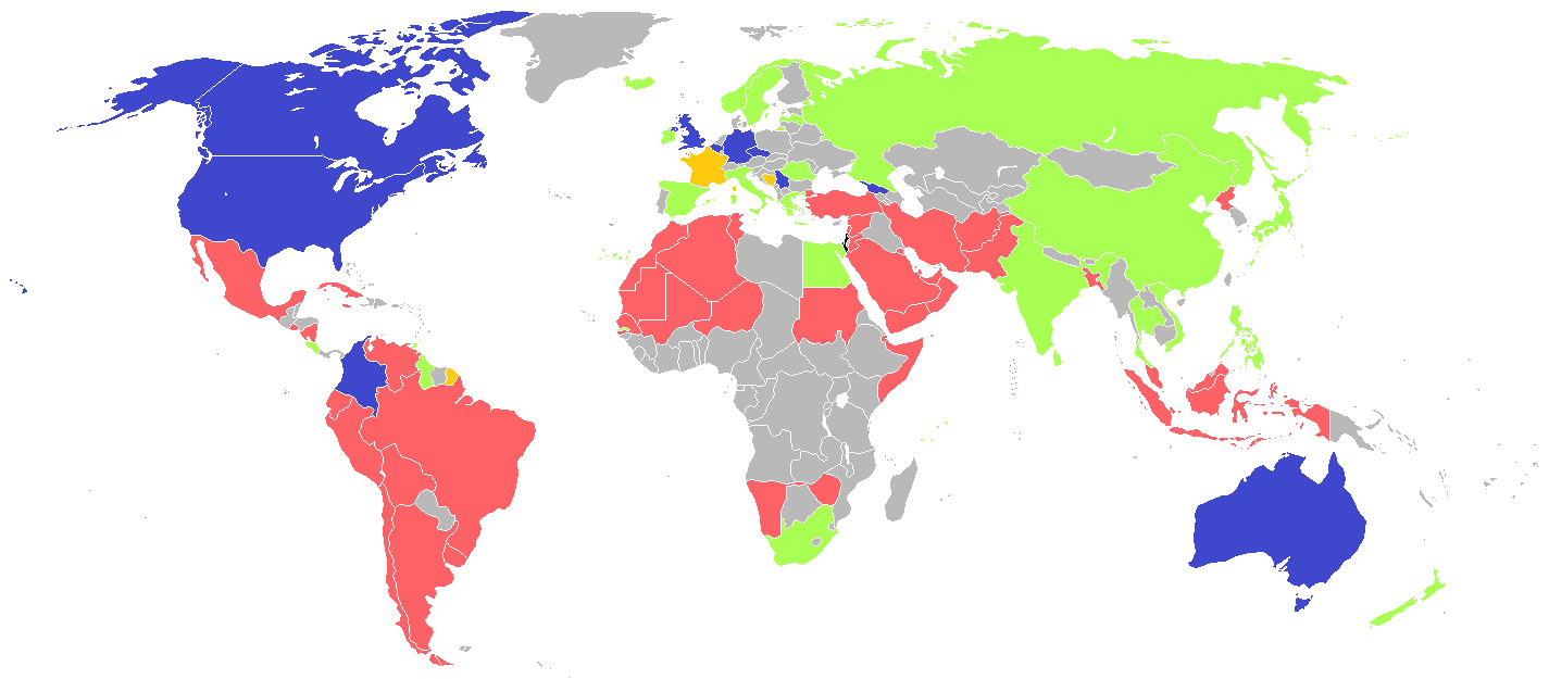 Réactions internationales sur l'opération Bordure protectrice Israël et Gaza. Pays ayant condamné l'action d'Israël. Pays ayant soutenu la position israélienne ou soutenu le droit d'Israël à se défendre. Pays ayant appelé à la fin des hostilités et ayant condamné les deux ou aucun des belligérants. Pays ayant des réactions officielles mixtes.